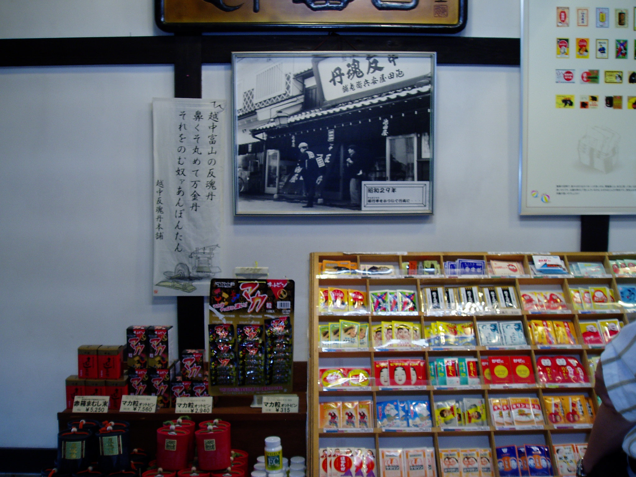 陳列棚に並んでいる医薬品